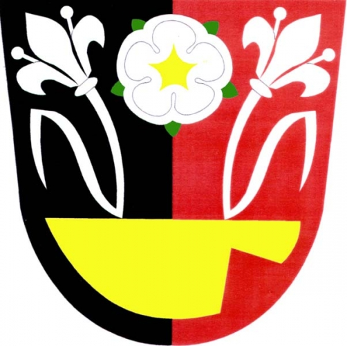 Znak, Krchleby, okres Šumperk